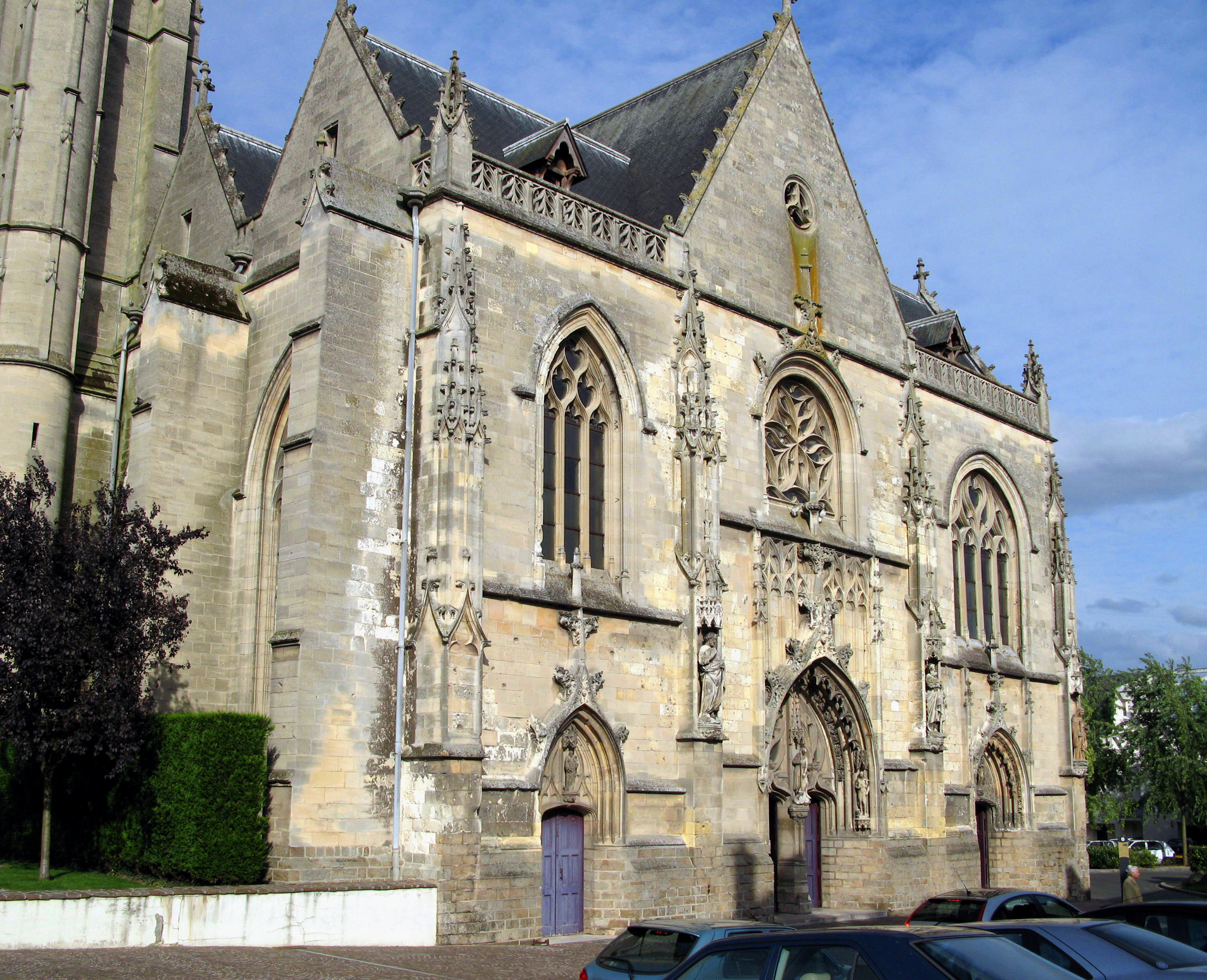 Péronne (Somme, France) - Façade de l'église.